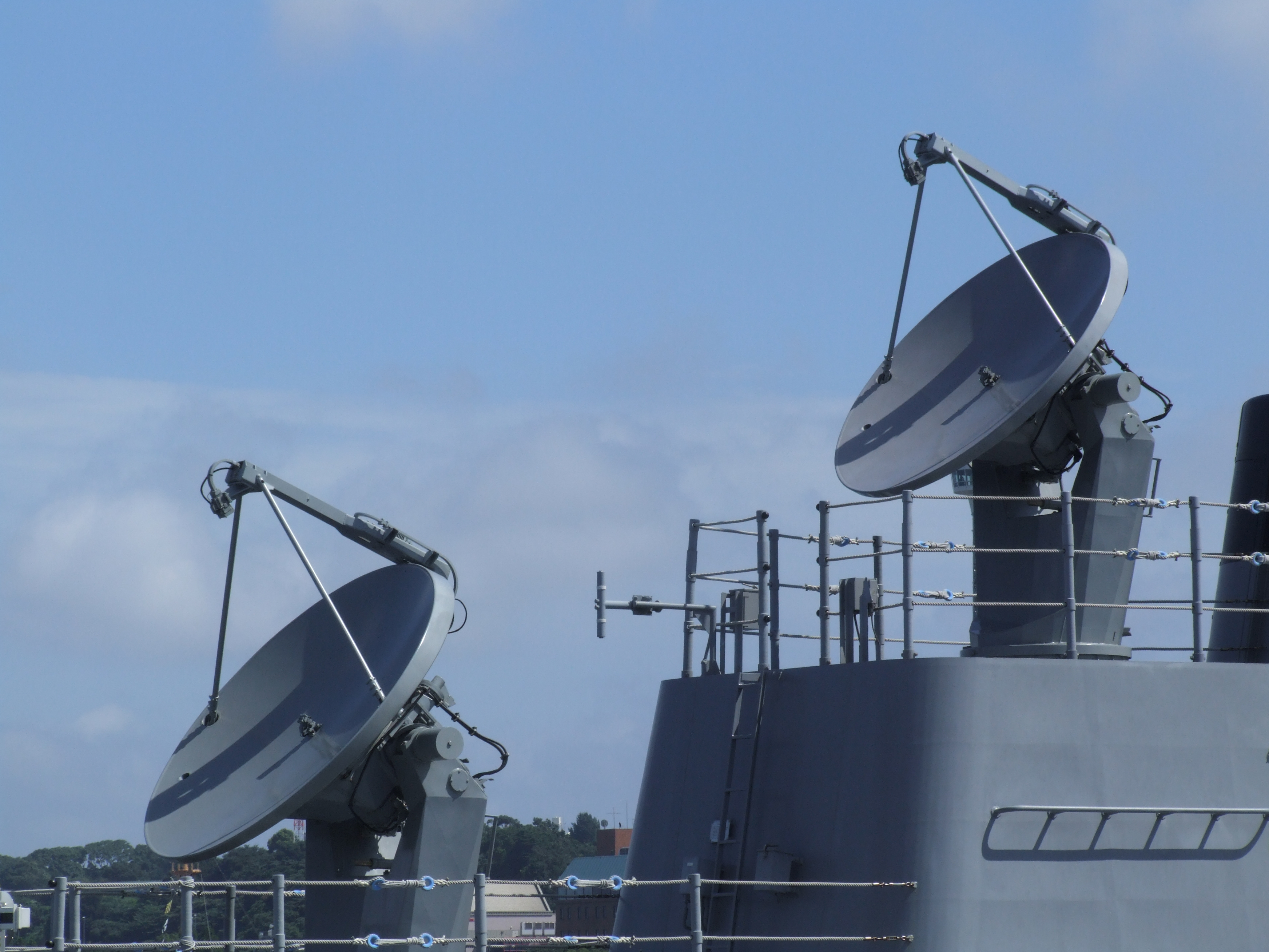 きりしまのSPG-62イルミネーターレーダー（横浜港開港150年での艦内開放にて撮影）